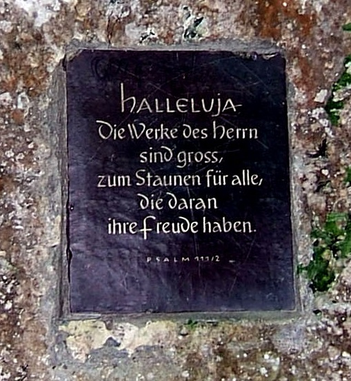 Uracher Wasserfall, Baden-Württemberg; Tafel mit Psalm 111,2 in Tuffhöhle neben dem Wasserfall.